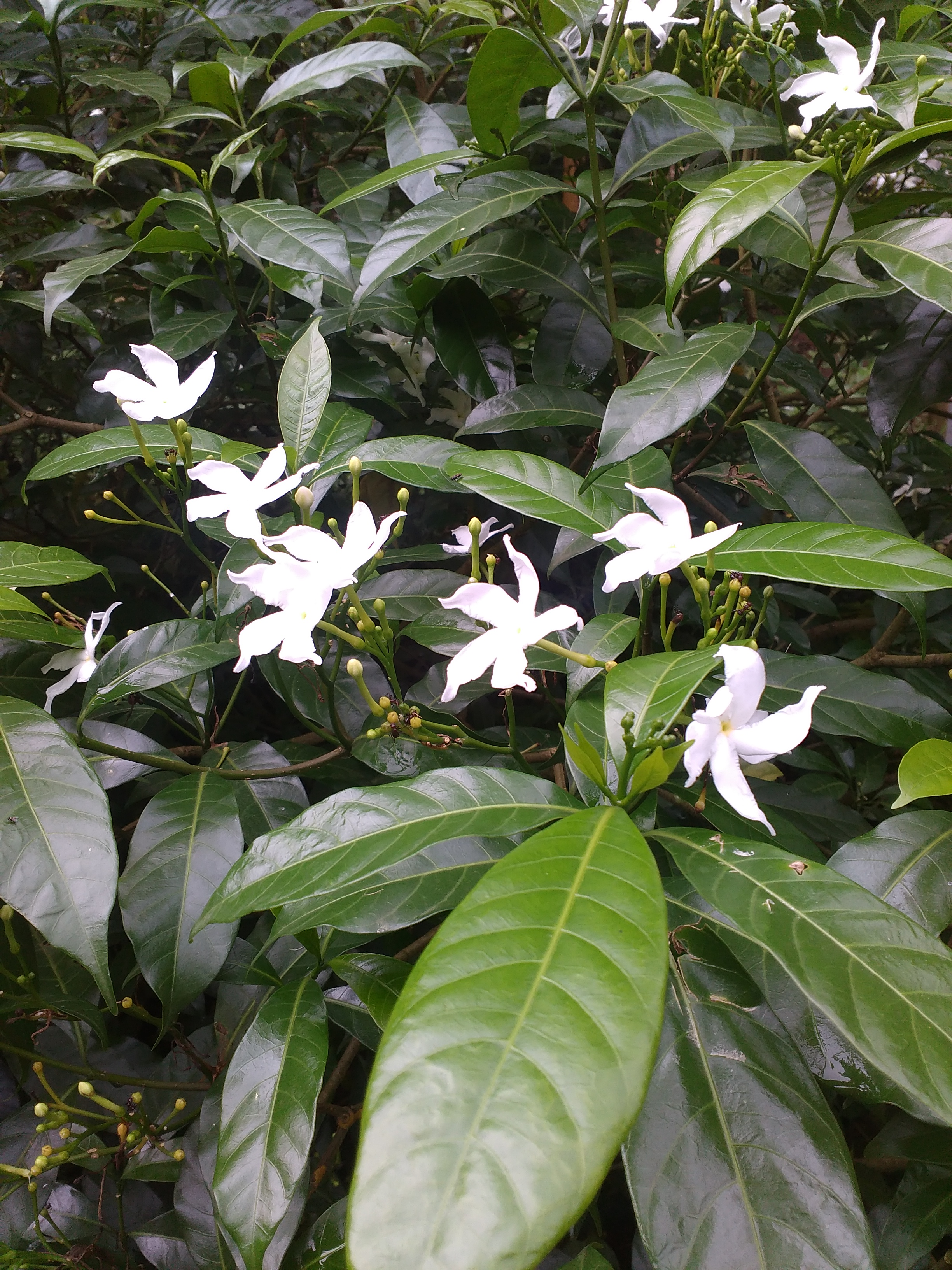 nanthyarvattam (Tabernaemontana divaricata) flower .Taken from Vellakkat mana